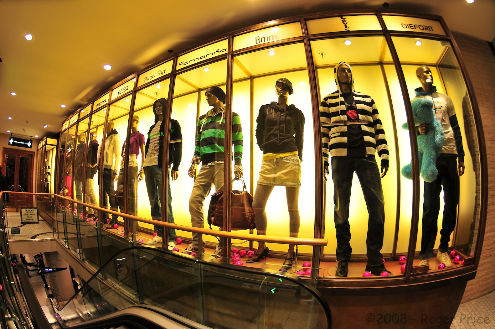 Antwerp shopping hotspot